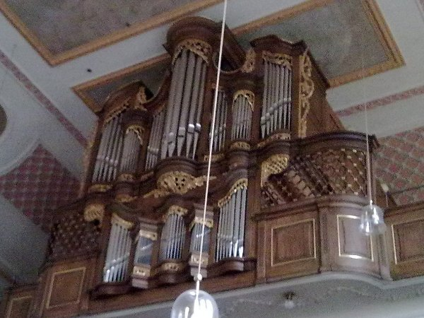 Stumm-Orgel der Katholischen Kirche St. Peter und Paul Bad Camberg